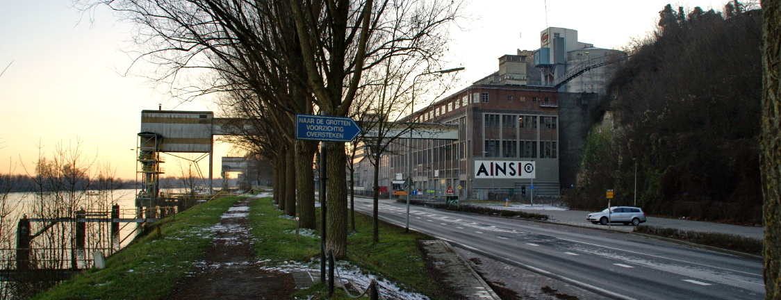 Cultuurfabriek AINSI, voorheen onderdeel van cementfabriek ENCI aan de Maas in Maastricht.